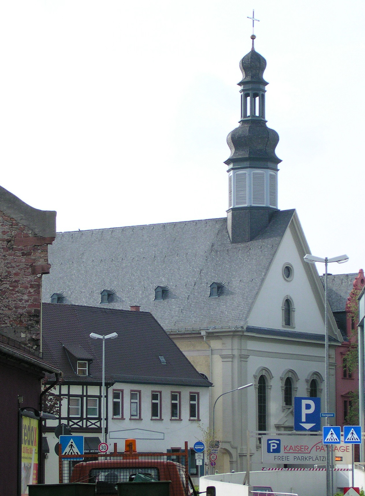 Worms, Friedrichskirche - Von der 1699 zugelassenen reformierten Gemeinde mit finanzieller Unterstützung auch aus Preußen (Name nach Friedrich d. Gr.) erbaut, benutzt ab 1744